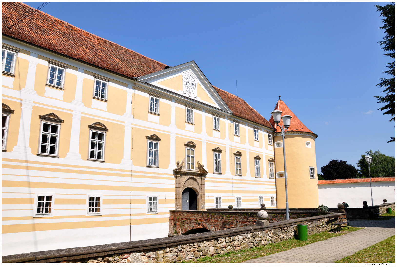 Das Schloss Windischfeistritz